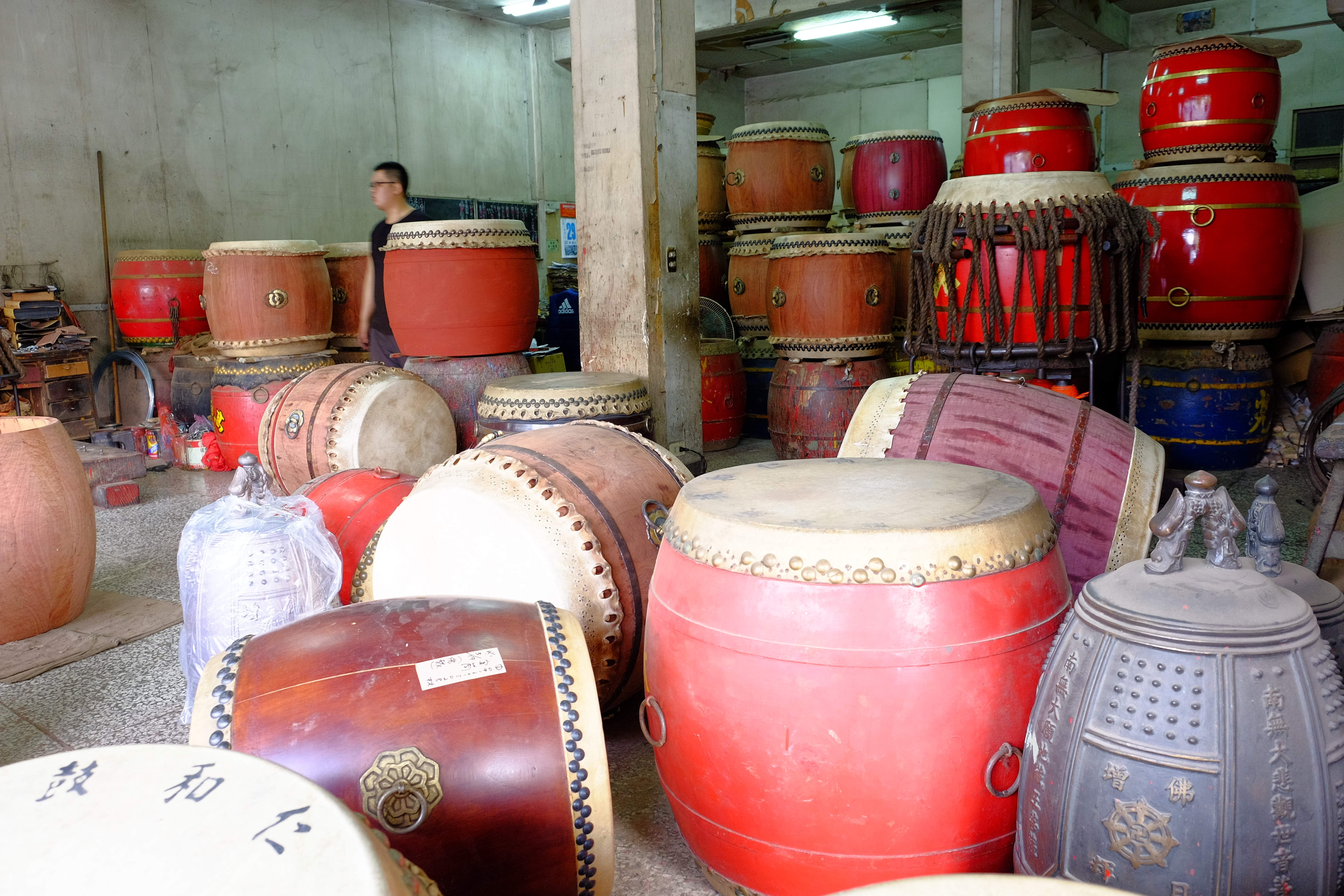 响仁和鐘鼓鼎廠